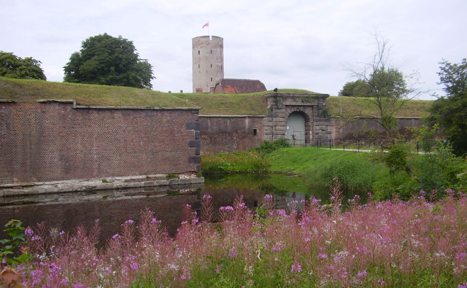 Twierdza Wisłoujście w Gdańsku.